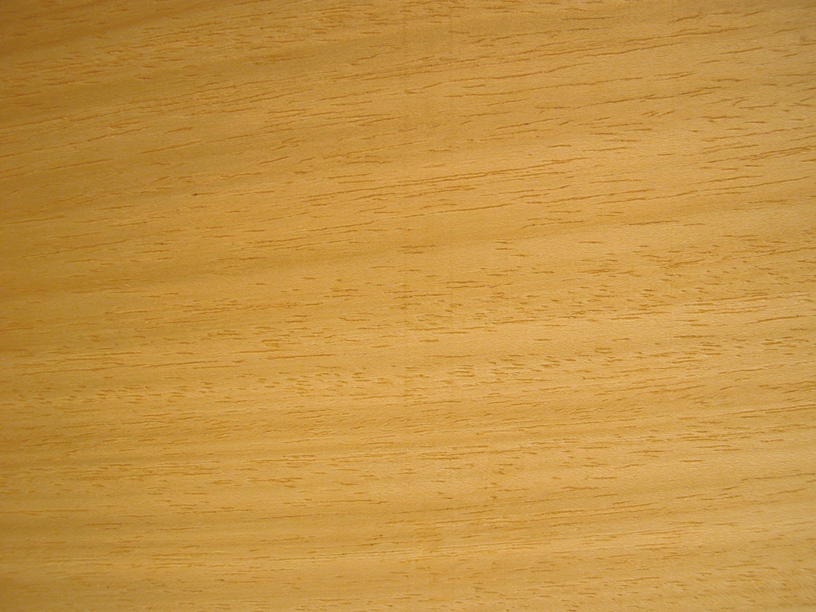 Abachiholz, gemessertes Furnier, geölt, nicht geschliffen